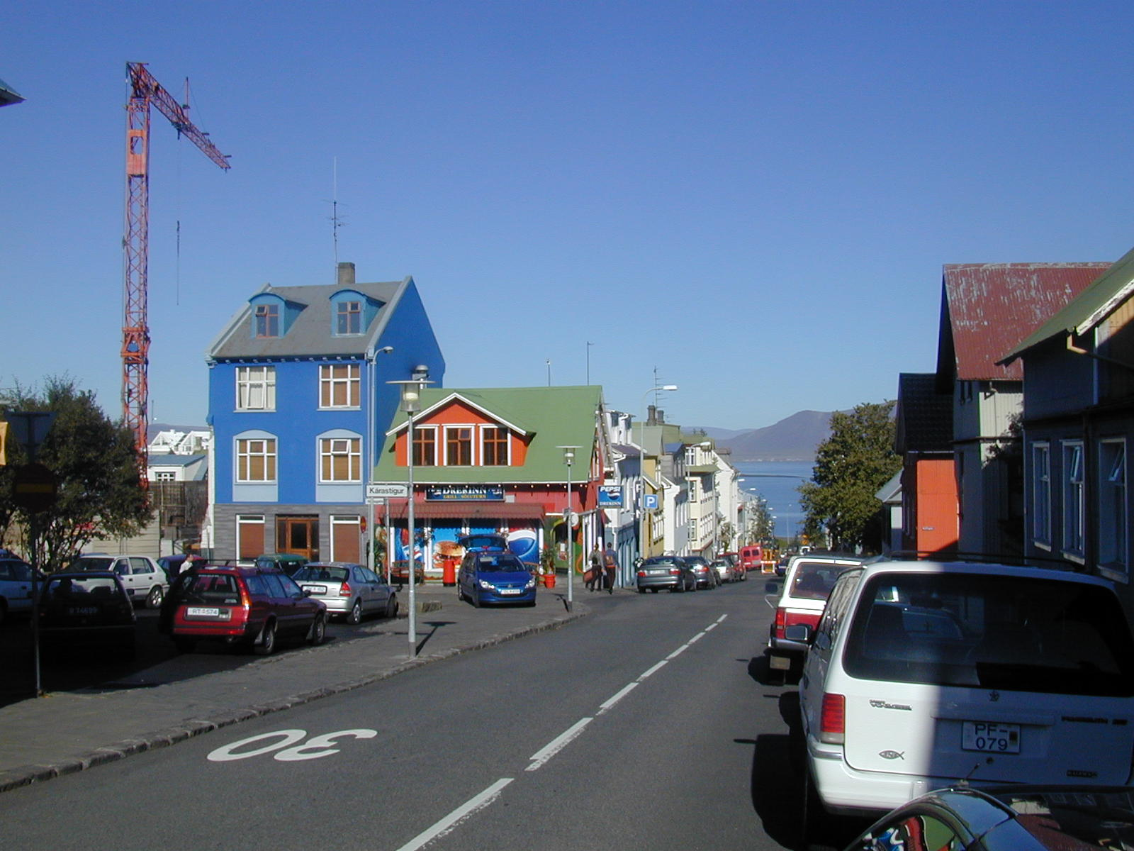 Frakkastígur in Reykjavík. Kárastígur zweigt links ab.